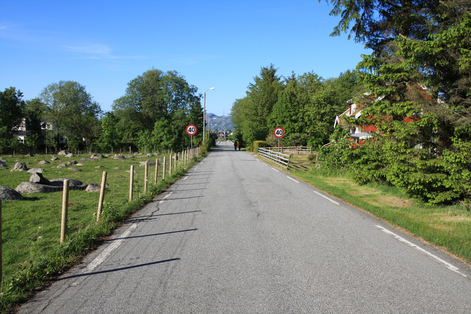 Fylkesvei 322 Asheimveien. I bakgrunnen kan en skimte broen over Rv44